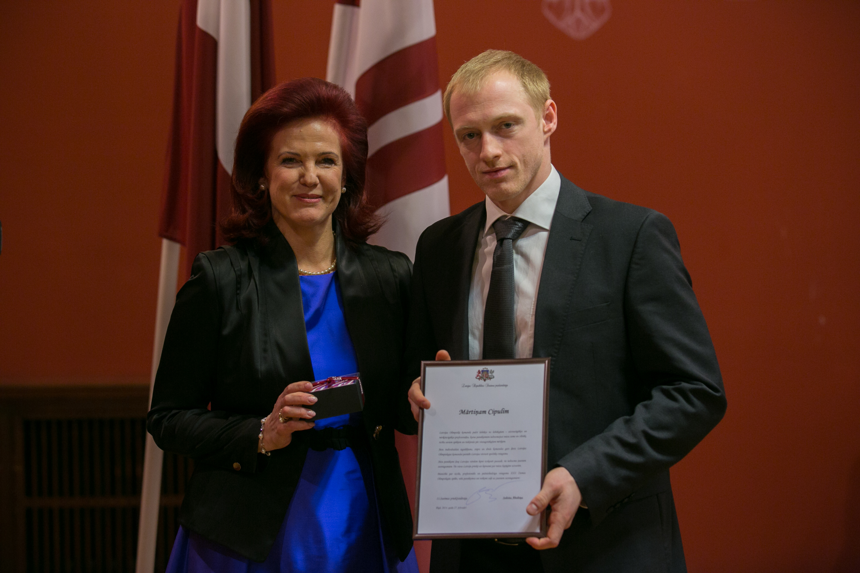 2014.gada 27.februāris. Saeimas priekšsēdētāja Solvita Āboltiņa tiekas ar Latvijas olimpisko komandu XXII Ziemas olimpiskajās spēlēs Sočos. Foto: Ernests Dinka, Saeimas Kanceleja Izmantošanas noteikumi: saeima.lv/lv/autortiesibas Solvita Āboltiņa tiekas ar Latvijas olimpisko komandu XXII Ziemas olimpiskajās spēlēs Sočos.